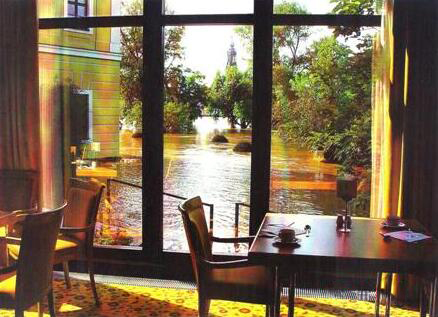 Hotel Bellevue in Dresden während des Elbe-Hochwassers 2002